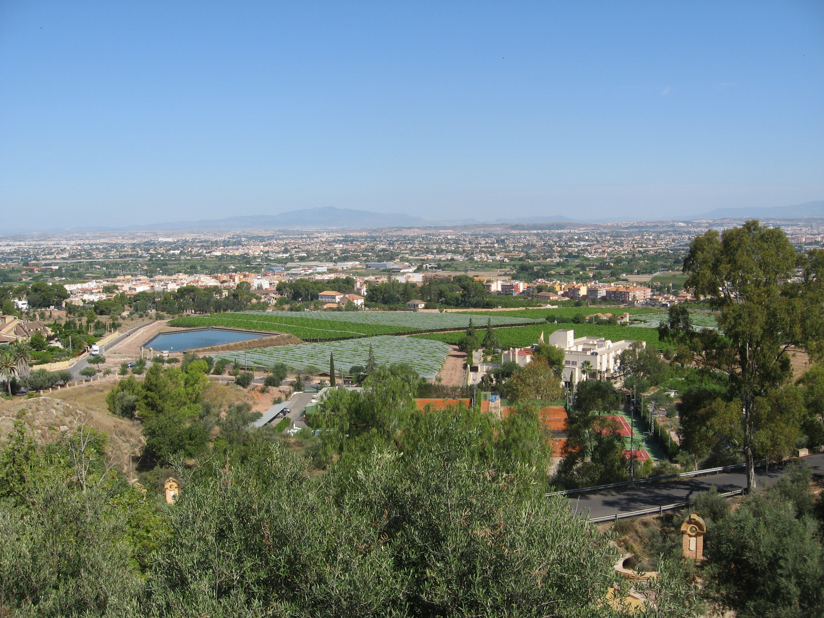 Vista de la huerta murciana, desde el Santuario de la Virgen de la Fuensanta, en Murcia